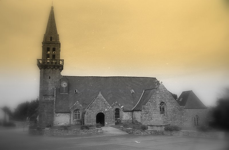 église Cloître St Thegonnec, denez goasguen